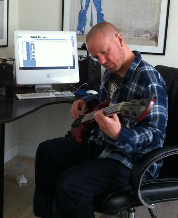 Anders Matthesen